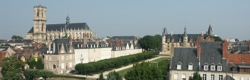 Palais Ducal Cathédrale Nevers